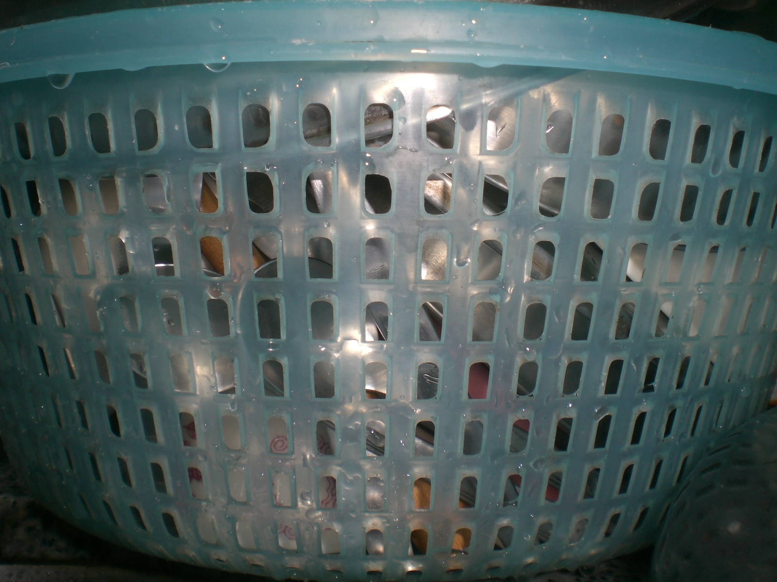 廚房用具